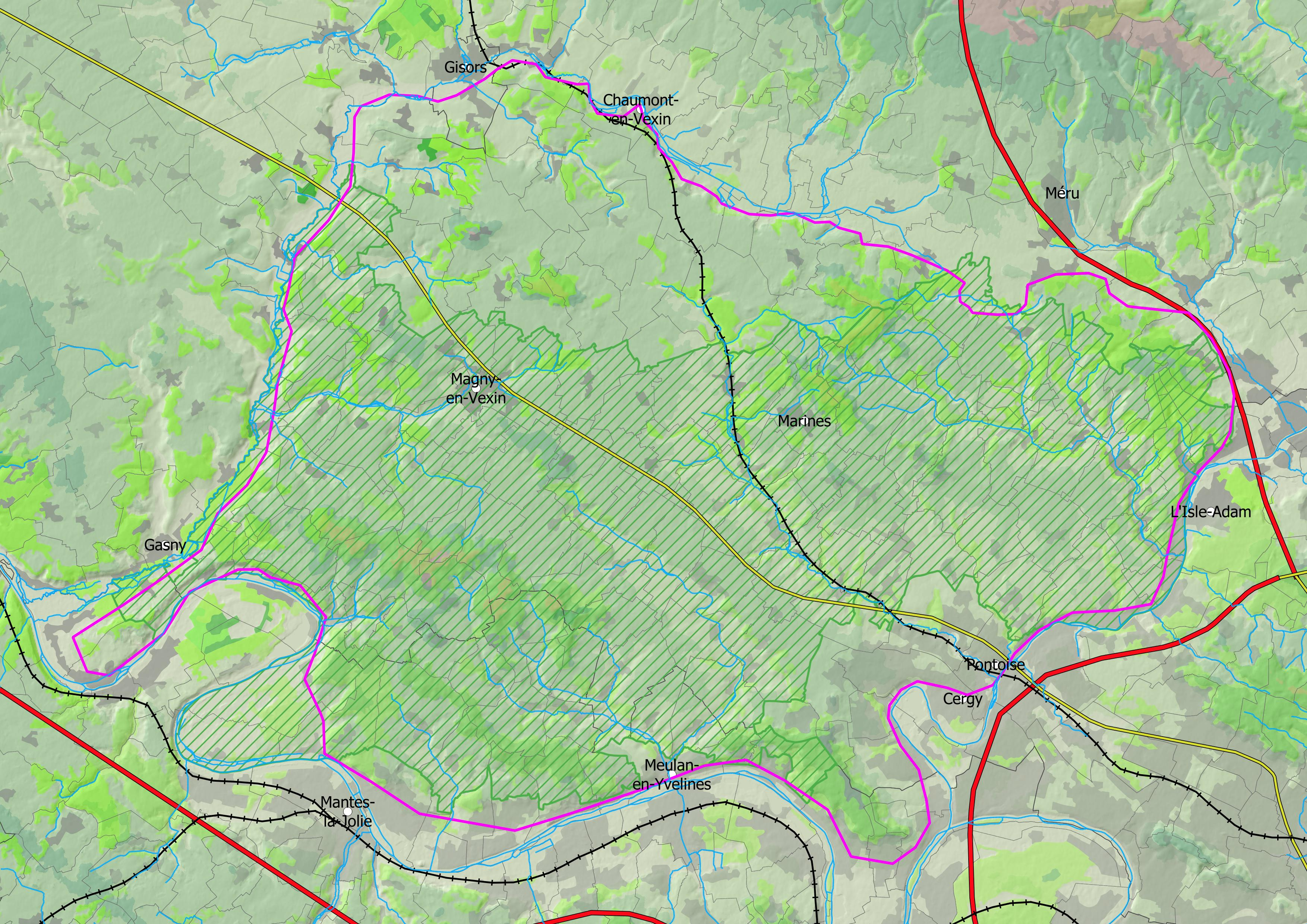 Carte topographique du Vexin français. Fond = EU DEM v1.1 (European Environment Agency (EEA) under the framework of the Copernicus programme), Corine Land Cover France (verts = forêts, gris = zones urbaines), WMS Carthage Sandre. Contours roses = limite géographique du plateau du Vexin français délimité par les vallées alluviales environnantes. Limites vertes hachurées = PNR du Vexin français (source : INPN). Routes et voies de chemin de fer issues de , lignes gris clair pointillées = limites des communes, lignes gris foncé pleines = limites des départements